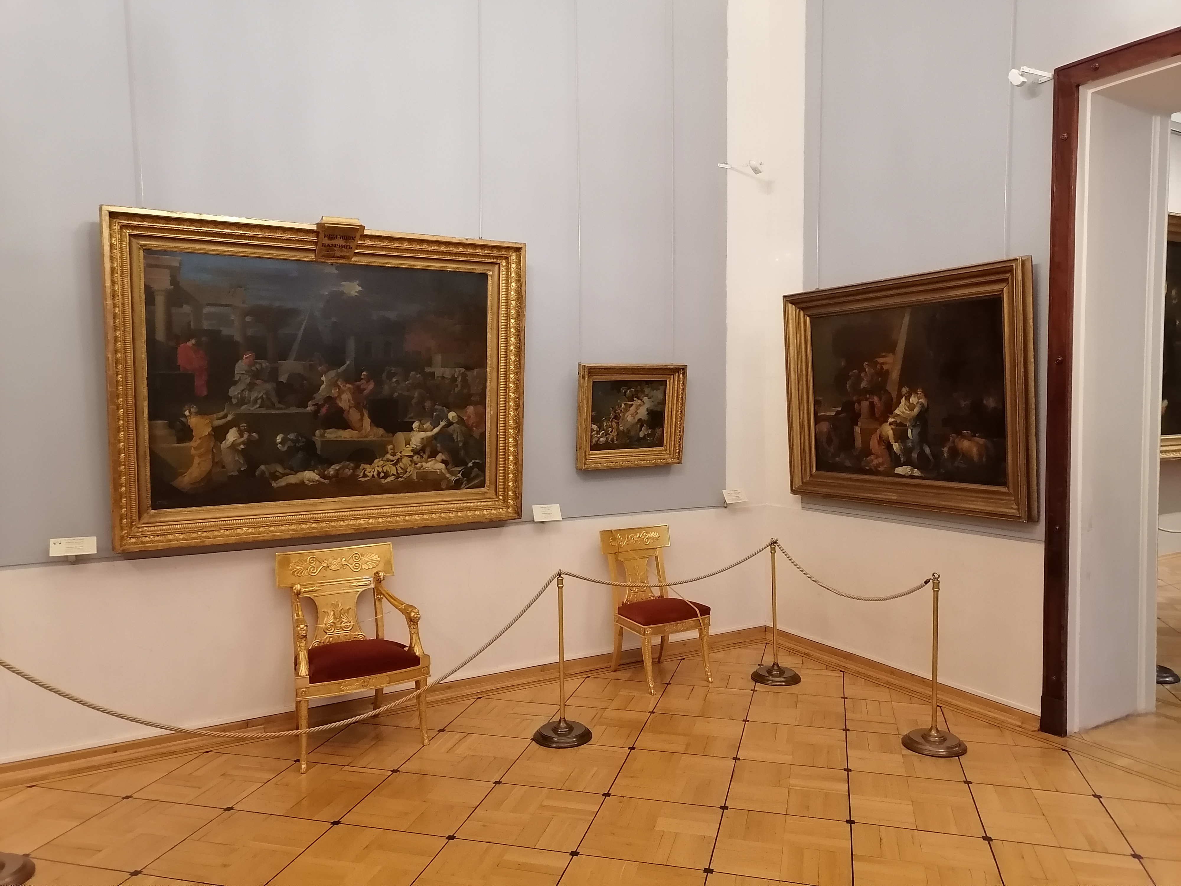 Зимний дворец - зал 278 - зал Себастьяна Бурдона